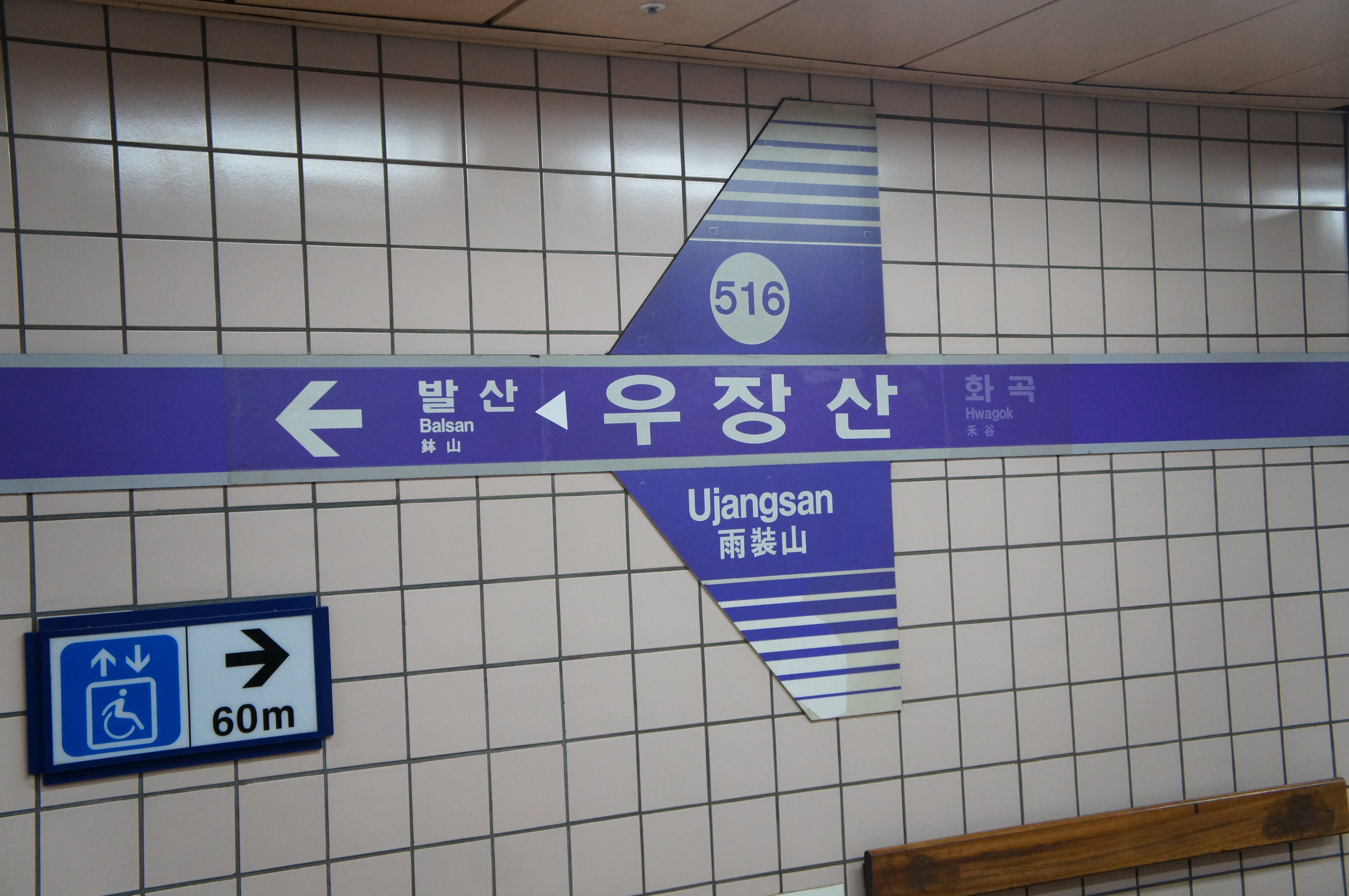 우장산역 역명판